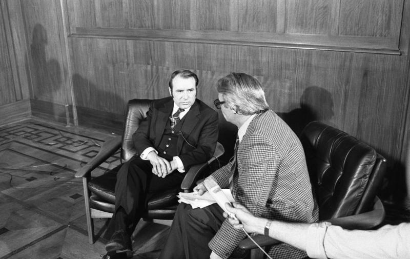 Wahl zum Abgeordneten von Berlin (West) Wahlnacht im Rathaus Schöneberg (links: Heinrich Lummer)